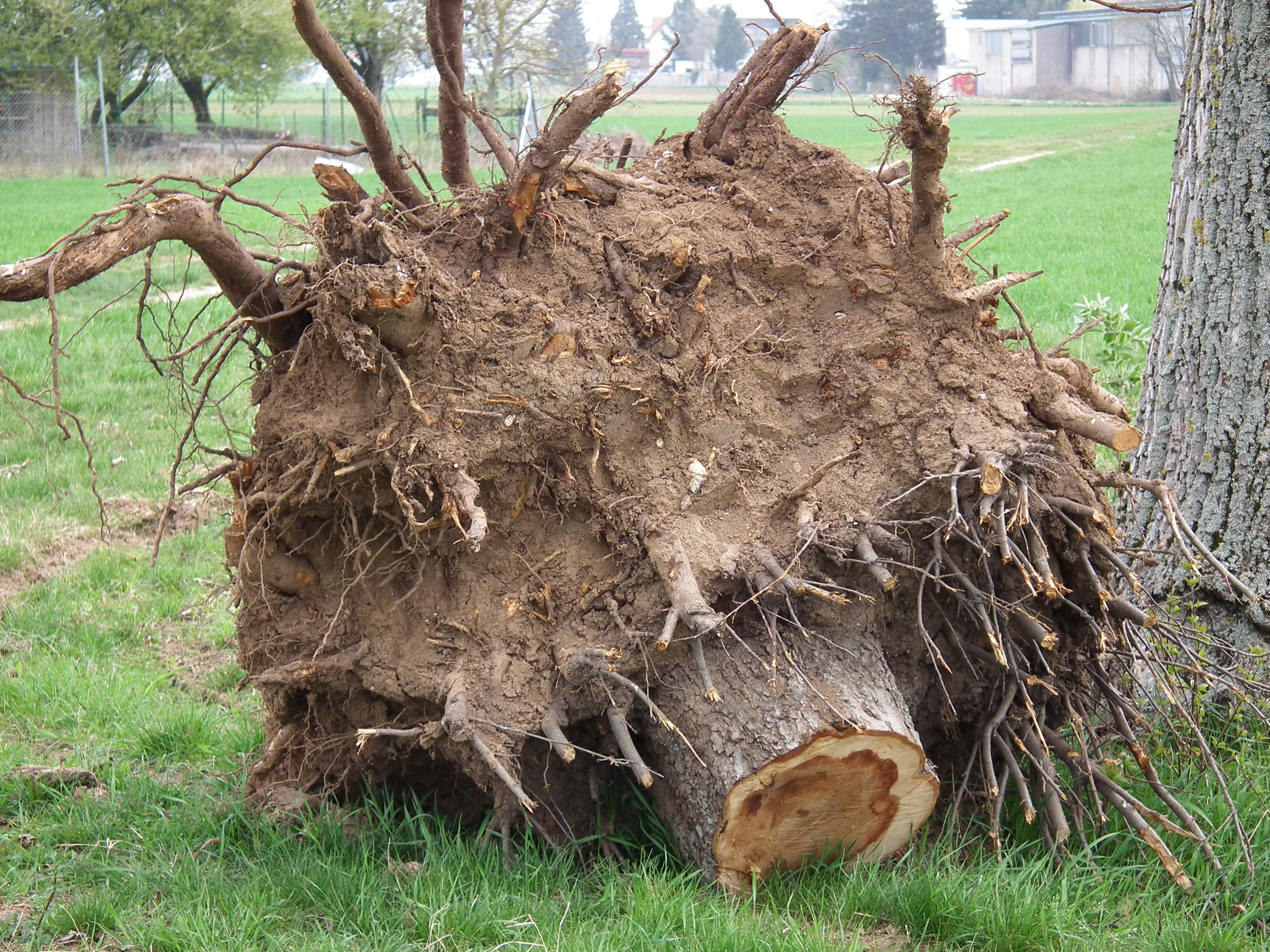 Wurzelballen eines gefällten, weil morschen Apfelbaums, fotografiert in der Nähe von Heidelberg (Baden-Württemberg, Deutschland)